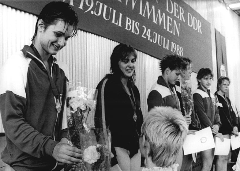 Birte Weigang, Heide Grein, Peggy Büchse ADN-ZB Settnik 24.7.88 Potsdam: 39. DDR-Meisterschaften im Schwimmen- mit der Jahresweltbestleistung von 2.09,54 min siegte Birte Weigang vom SC Turbine Erfurt (l) im 200-M-Schmetterlings-Finale. Heide Grein (ASK Vorwärts Potsdam, 2.v.l.) und Peggy Büchse (SC Empor Rostock, 3.v.l.) folgten auf den Plätzen.